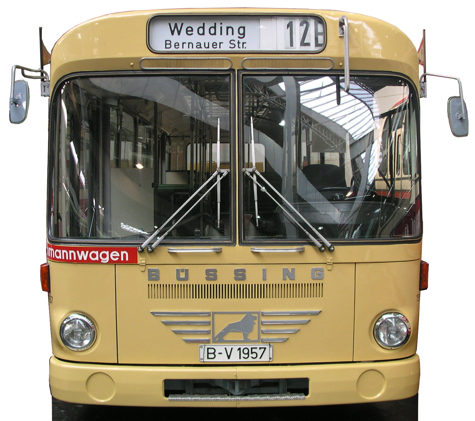 Nutzfahrzeug-IAA 2004 in Hannover Büssing BS 110 V-SL der BVG (jetzt der Arbeitsgemeinschaft Traditionsbus Berlin), Erstzulassung 10.1.1972, Fahrgestellnummer 4010064, Motor U10H, Automatikgetriebe VOITH DIW 506, 110 kW (150 PS), vmax 75 km/h, 38 Sitzplätze, 71 Stehplätze, Büssing Fahrzeug bereits mit MAN-Karosserie, 1. VÖV-Standard-I-Bauserie mit Standard-Überland-Bus-Front, gebrauchte U10-Motoren aus Büssing-D2U-Doppeldeckern wurden aufgearbeitet und als U10H in diese Serie eingebaut, die die einzige BVG-Standardbusserie mit Einzelradaufhängung vorne war und von der nur noch 2 Exemplare existieren.